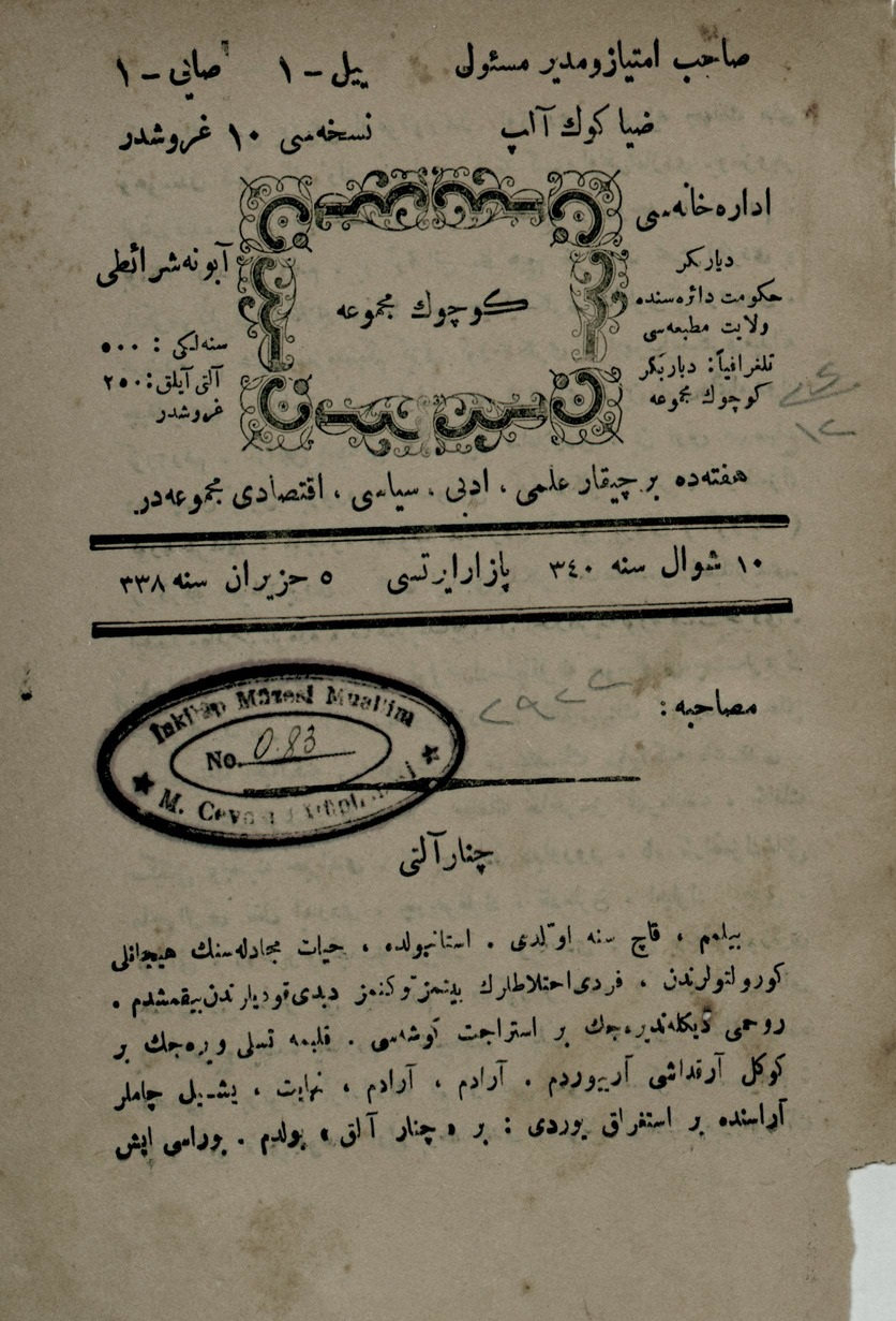 Ziya Gökalp'in 1922-1923 tarihleri arasında çıkardığı Küçük Mecmua dergisinin ilk cildinin ilk sayfası.